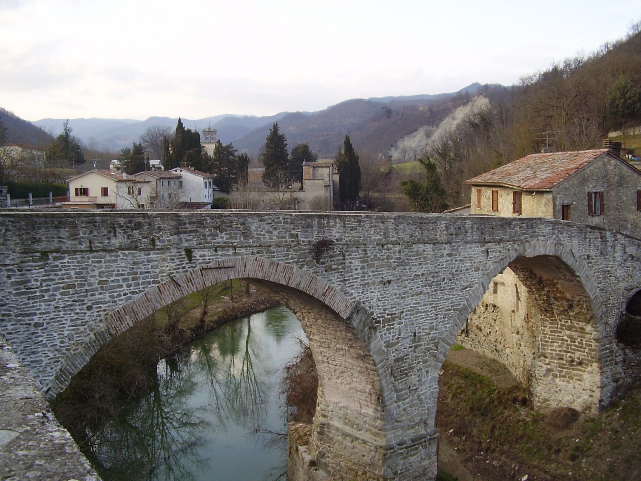 Mercatello sul Metauro, Ponte Romanico a tre arcate sul fiume Metauro.